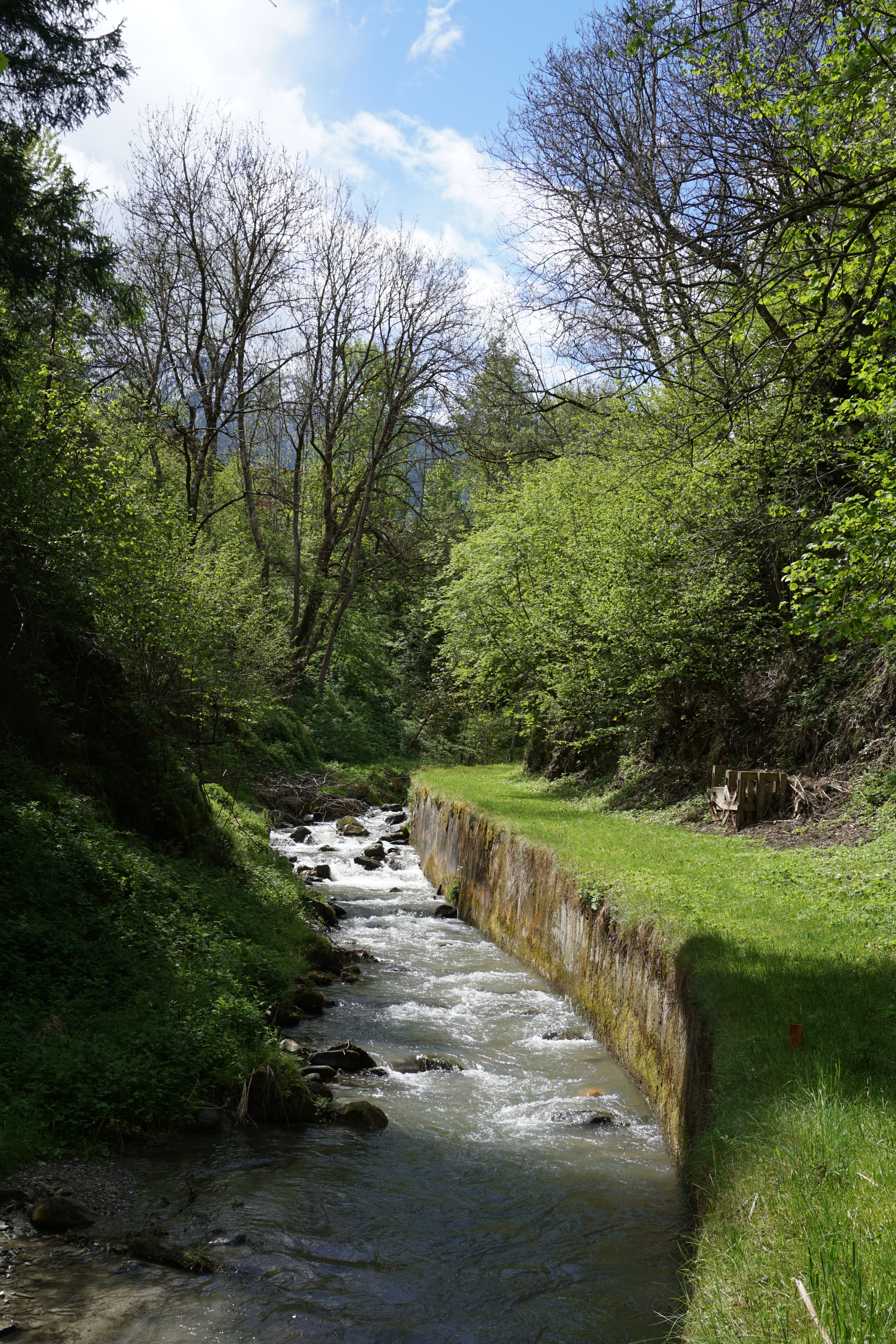 Axamer Bach nach dem Axamer Siedlungsgebiet